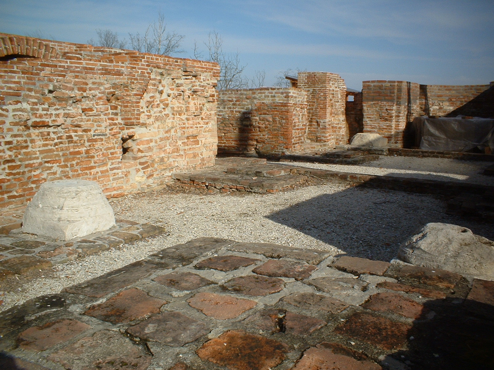 Szent Jakab apátság romjai (Kaposvár, KAPOSSZENTJAKAB) This is a photo of a monument in Hungary. Identifier: 7937